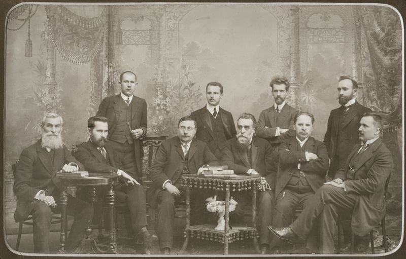 Committee of the Lithuanian Scientific Society. From left, sitting: Juozas Kairiūkštis, Antanas Smetona, Augustas Niemi, Jonas Basanavičius, Antanas Vileišis and Jonas Vileišis. From left, standing: Juozas Balčikonis, Zigmas Žemaitis, Mykolas Biržiška, Jurgis Šlapelis.